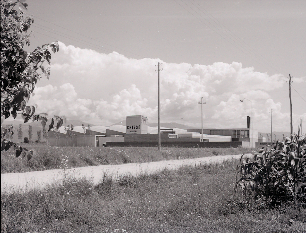 Servizio fotografico : Udine, 1960 / Paolo Monti. - Buste: 11, Fototipi: 21 : Negativo b/n, gelatina bromuro d'argento/ pellicola ; 6x6. - ((Serie costituita da 11 negativi identificati con i nn.: 16731-16784. Sulla busta R16764 manoscritto: "Valle". Numerazione parallela: 17-26La suddetta serie è contenuta nella scatola identificata con la numerazione R16657-17048. - Fonte: Rubrica di Paolo Monti: Archivio 10x12 (ultimi numerati) - dal G1 al (s.d.), presso Archivio Paolo Monti Tipografia Chiesa - Molin Nuovo